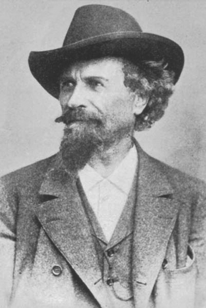 Architekt Carl Ritter von Borkowski (†1905) ca. 1880